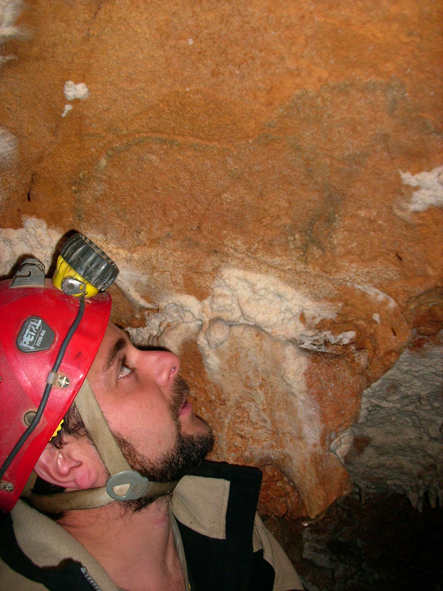 Grotte du Pech d'arsou